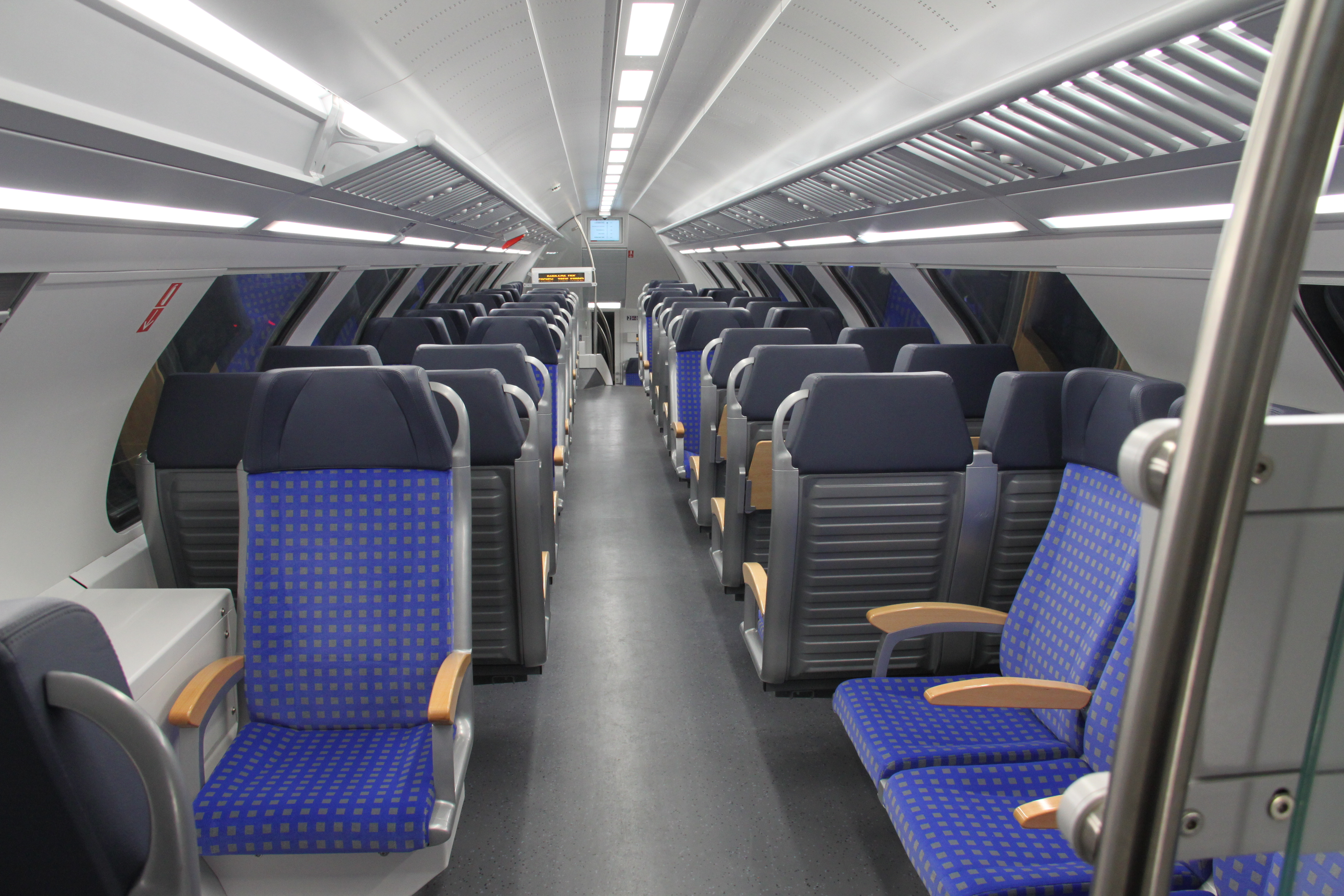 Interieur tweede klasse van een Class 2300 van de CFL.